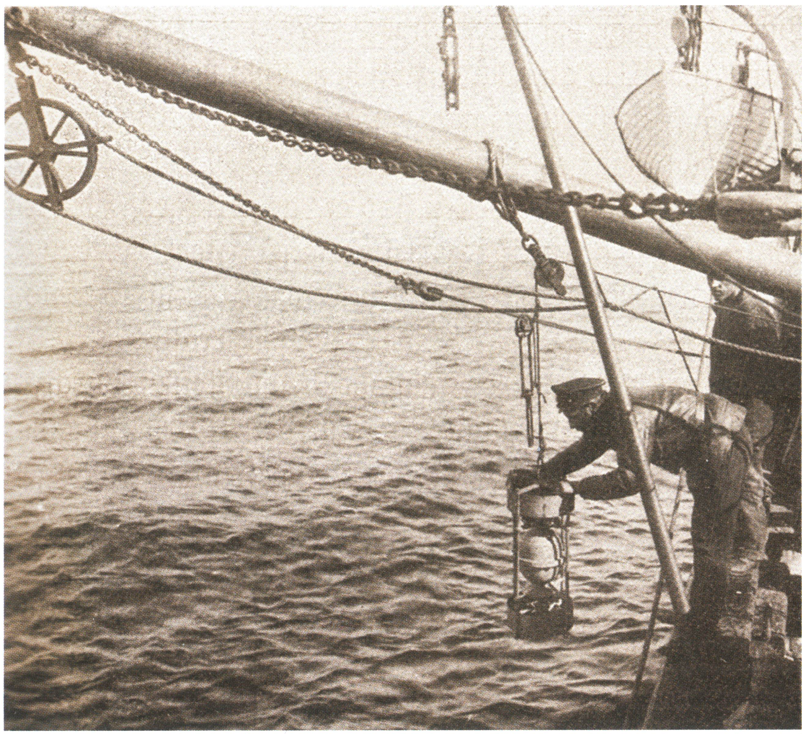 А.В. Колчак измеряет температуру и берет пробы воды на гидрохимический анализ с помощью барометра Тимченко